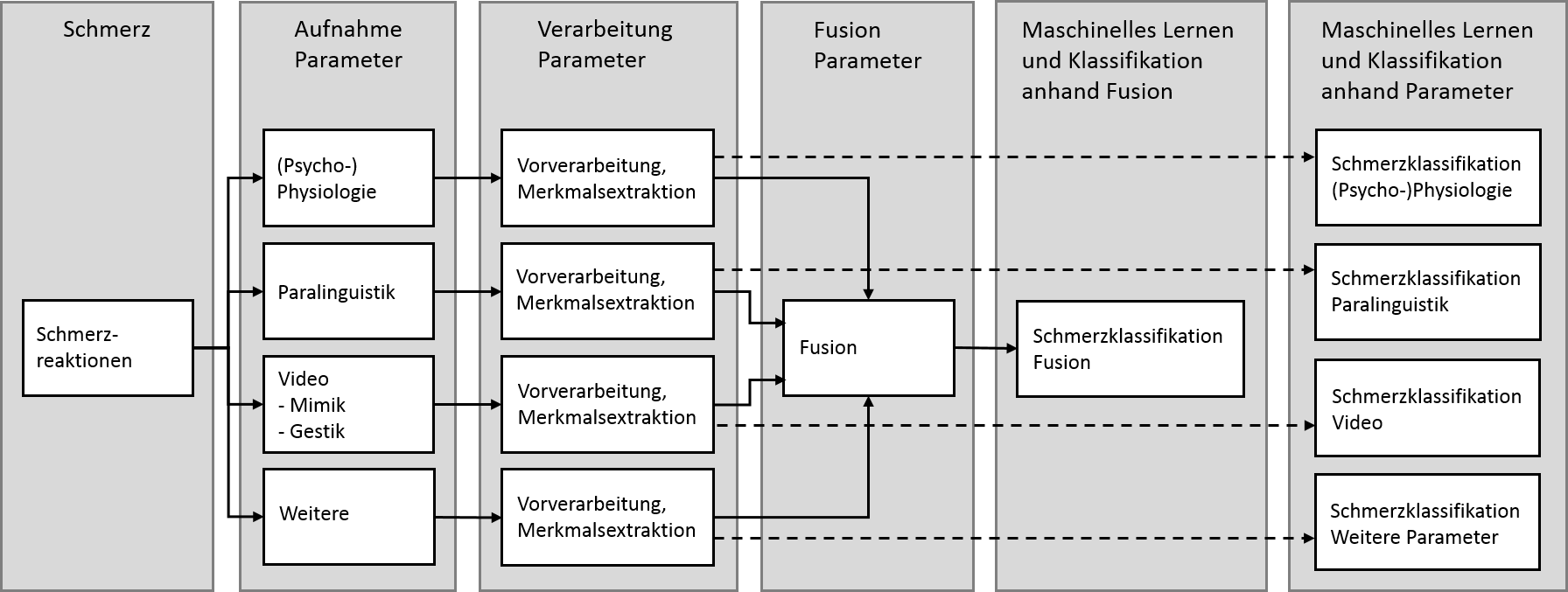 Vereinfachter Prozess der Automatisierten Schmerzerkennung. Ablauf von links nach rechts: Entstehung des Schmerzes, Aufnahme der Schmerzreaktionen, (optionale) Fusion der Modalitäten, Schmerzklassifikation anhand Fusion, Schmerzklassifikation anhand einzelner Parameter.